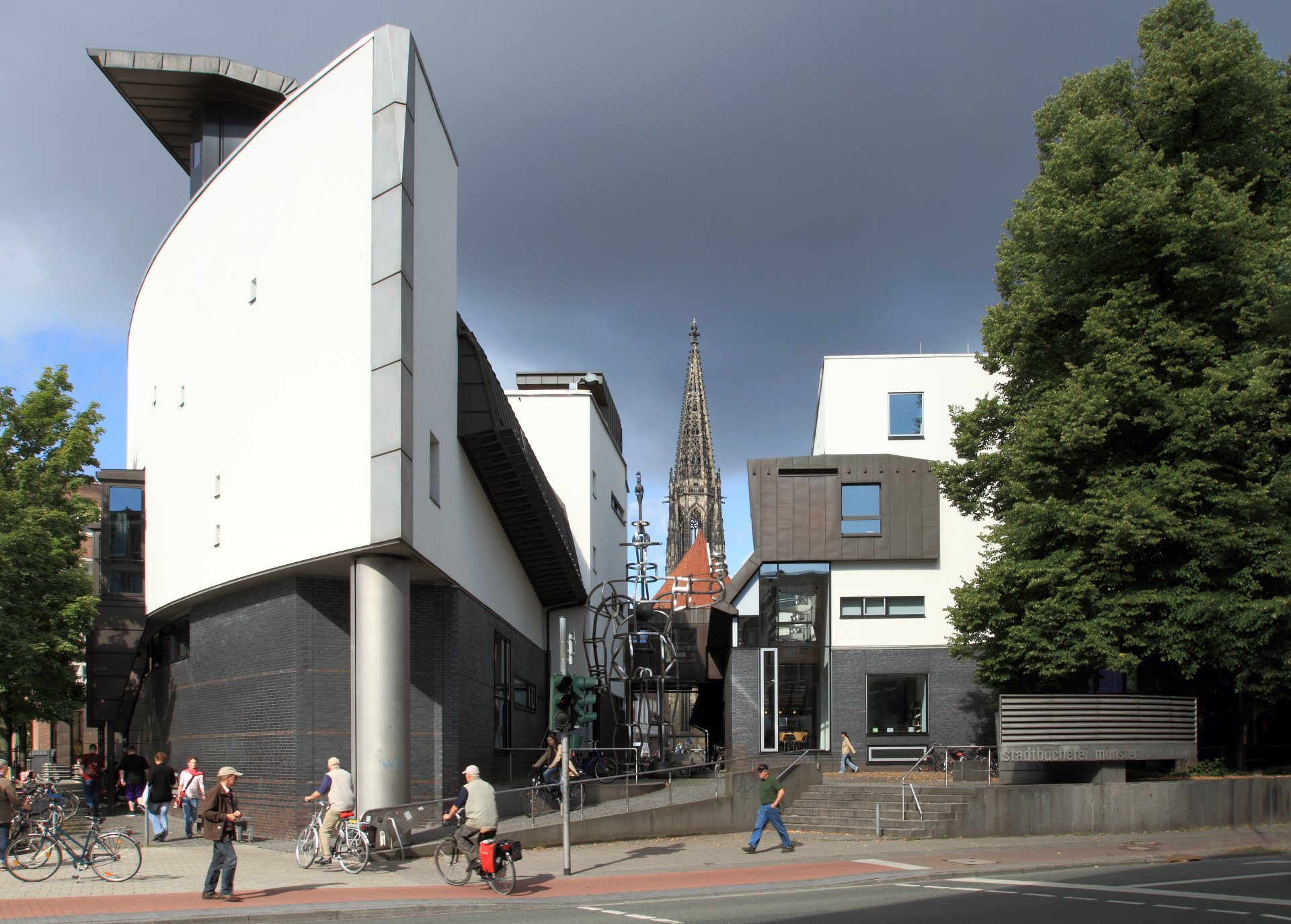 Die Stadtbücherei mit Blick auf die Lambertikirche